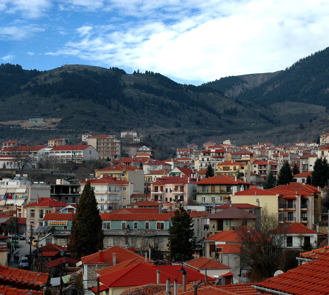 Karpenissi, Greece